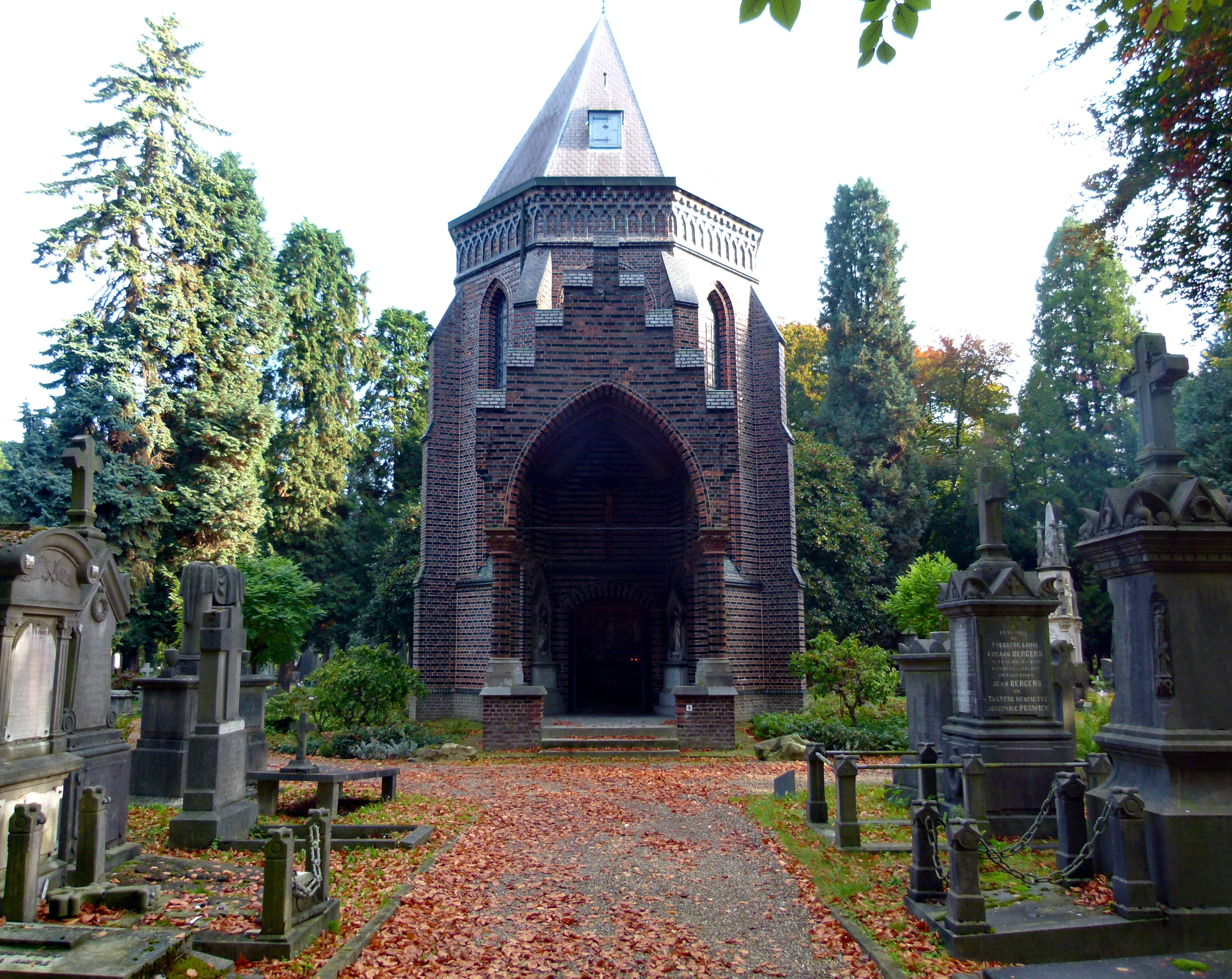 Neogotische kapel (Joh. Kayser, 1885-90) op de Algemene Begraafplaats Tongerseweg in Maastricht.